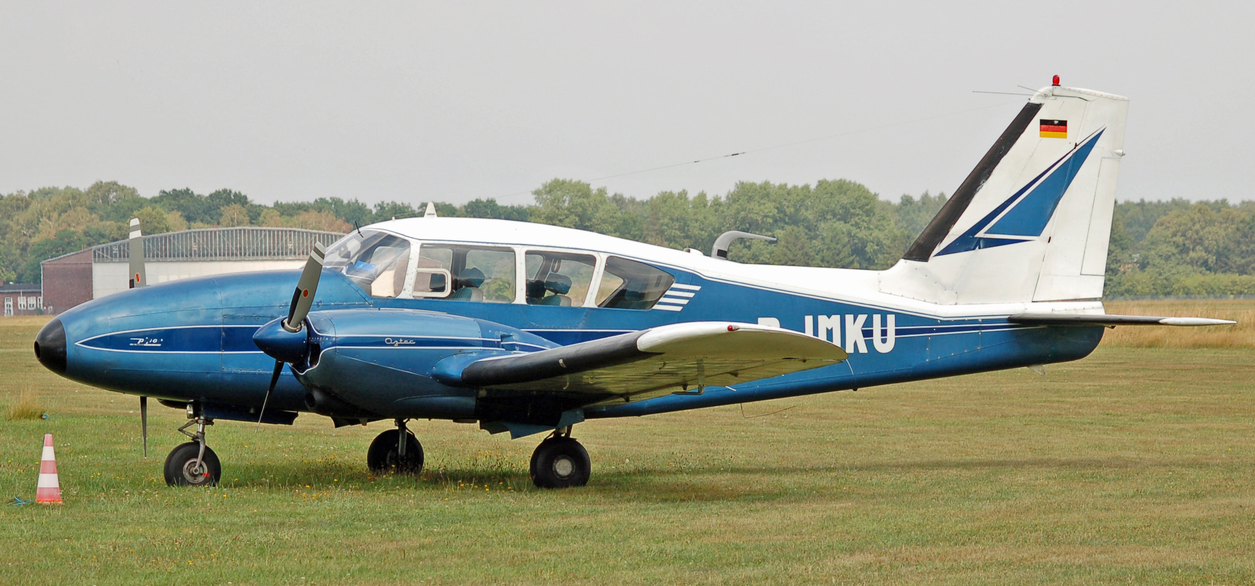 Piper PA-23 Aztec (D-IMKU) auf dem Flugplatz Uetersen